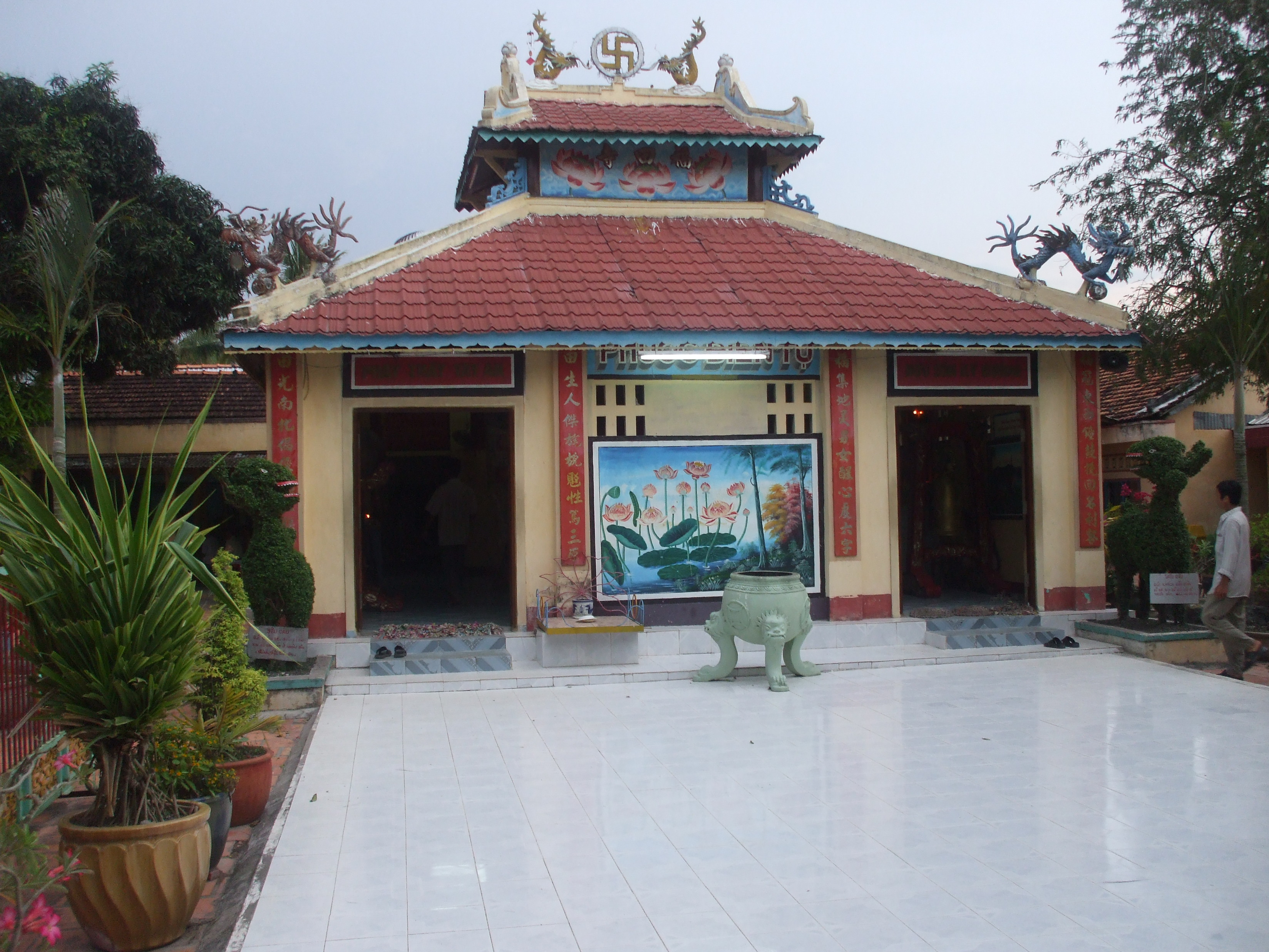 Phước Điền tự, cất trên nền trại ruộng xưa của Đoàn Minh Huyên, nay thuộc xã Thới Sơn, huyện Tịnh Biên, An Giang.